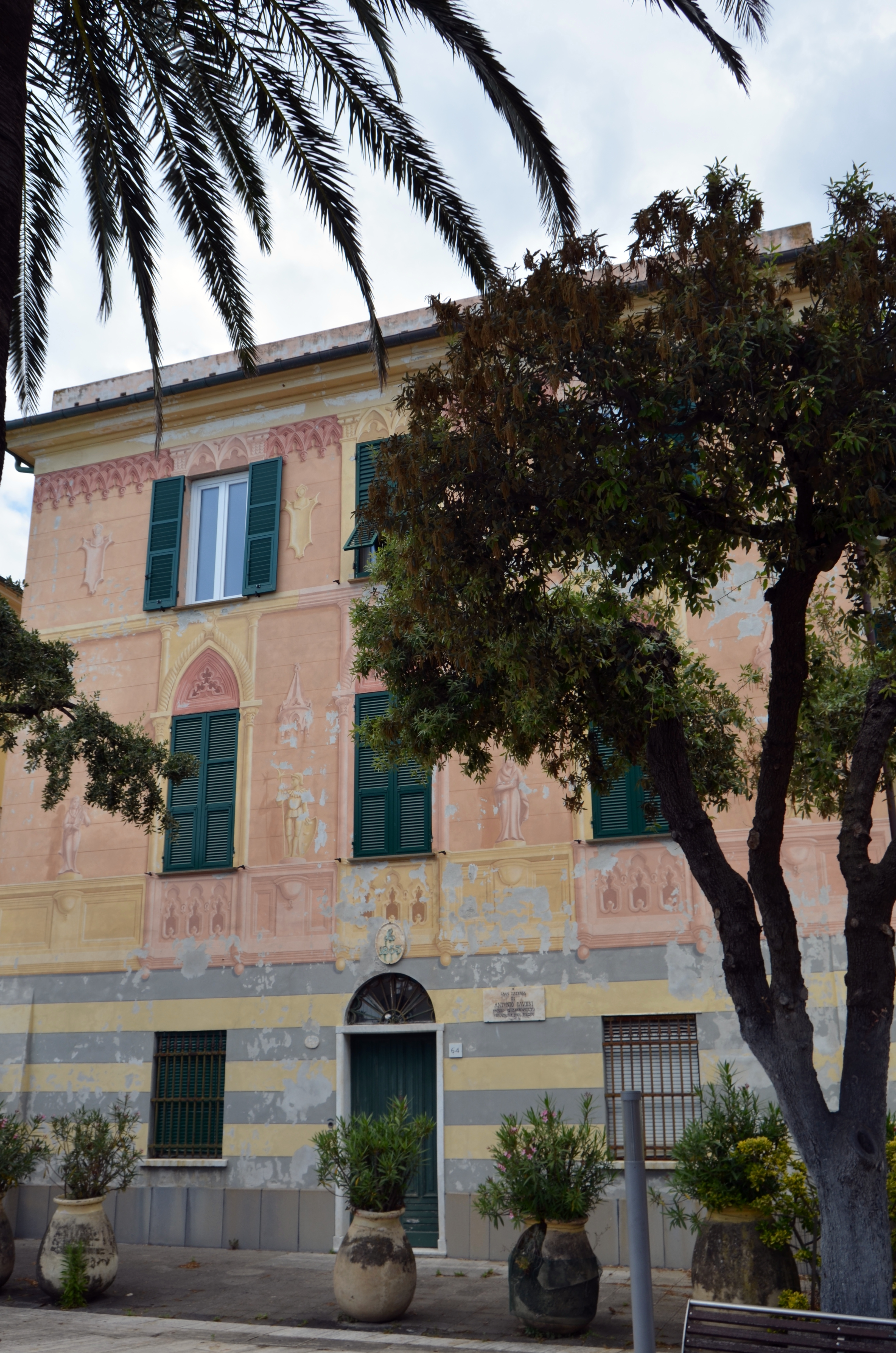 Casa paterna di Antonio Caveri a Moneglia, Liguria, Italia